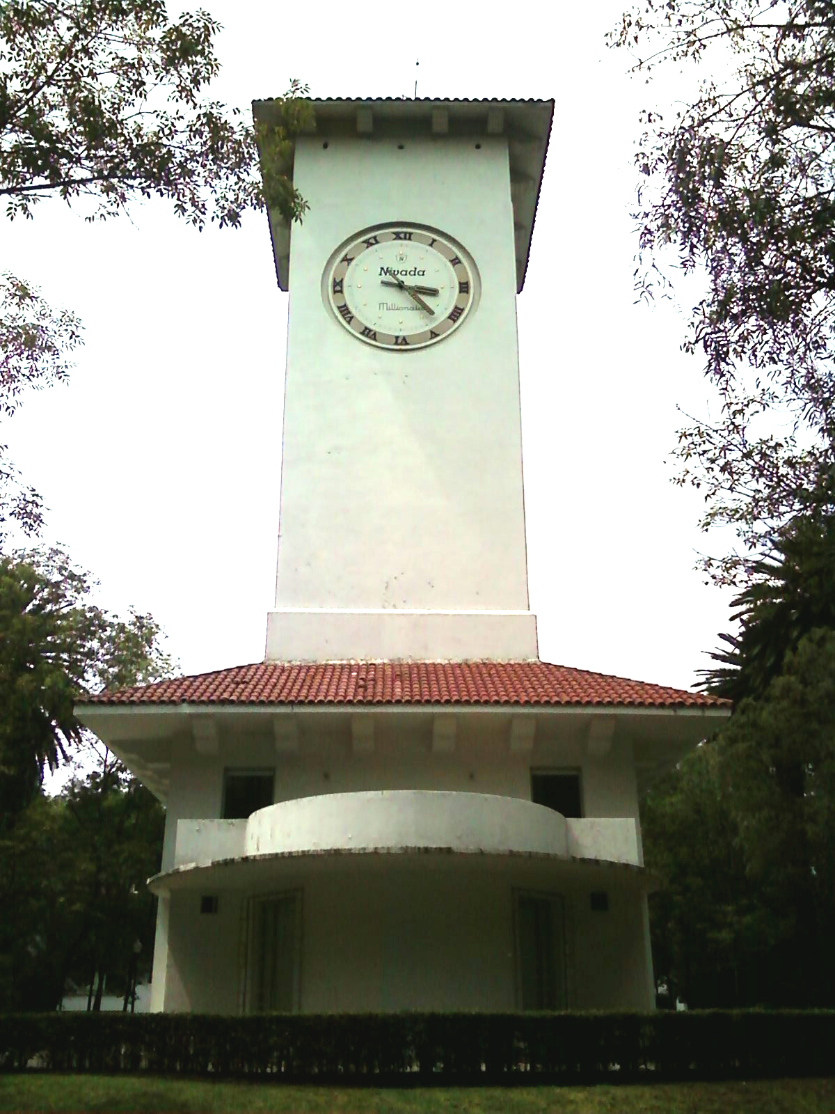 torre del reloj en parque lincoln ciudad de méxico